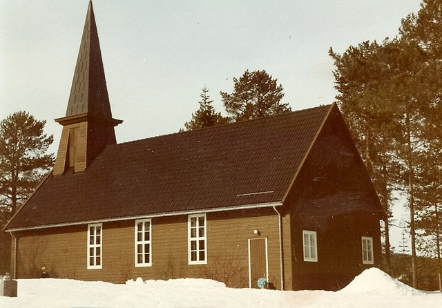 Tørberget kapell